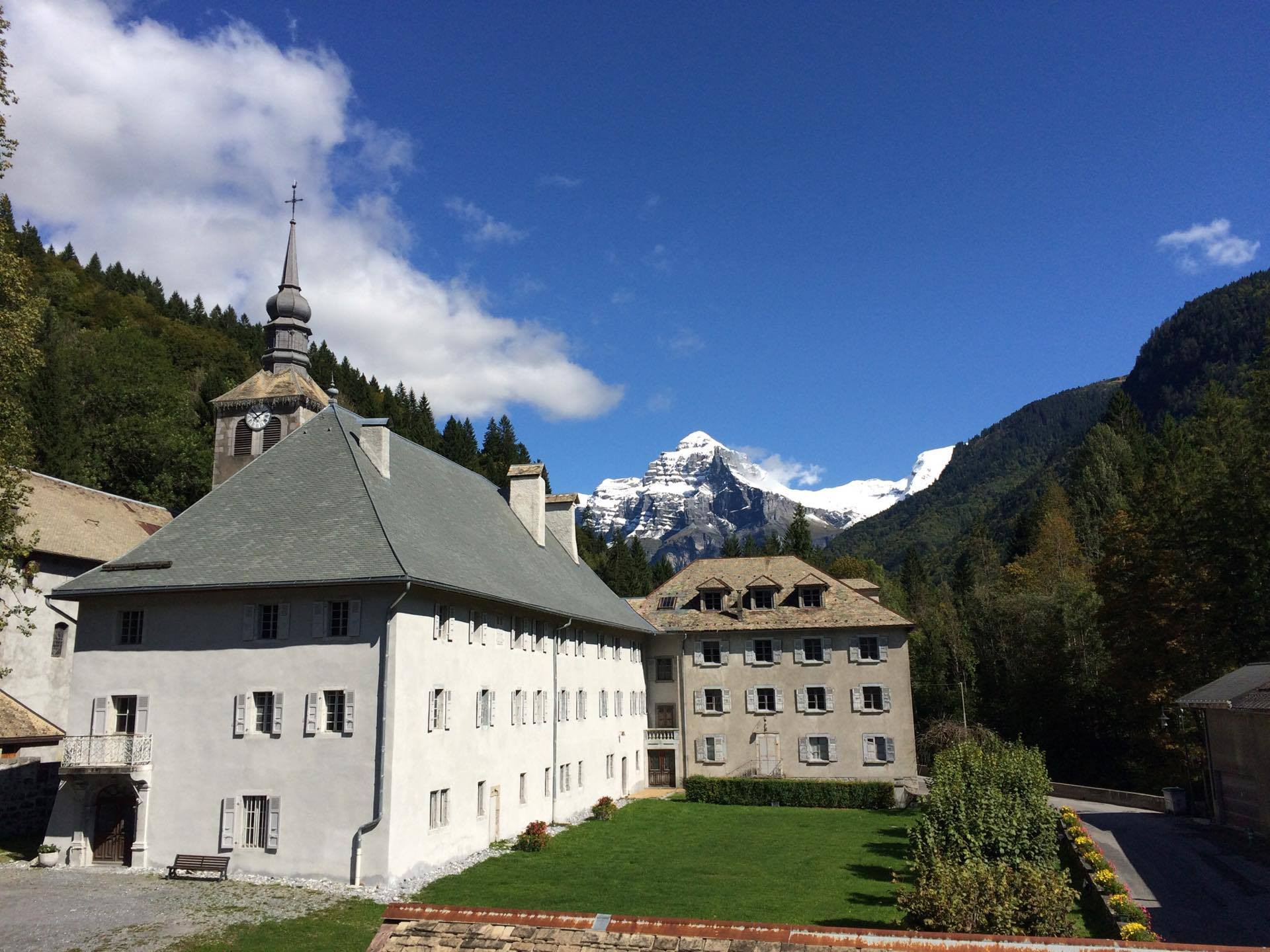 Vue de l'abbaye au premier plan, du clocher de l'église (à gauche) et de l'ancien hôtel du Fer-à-Cheval (sur la droite).